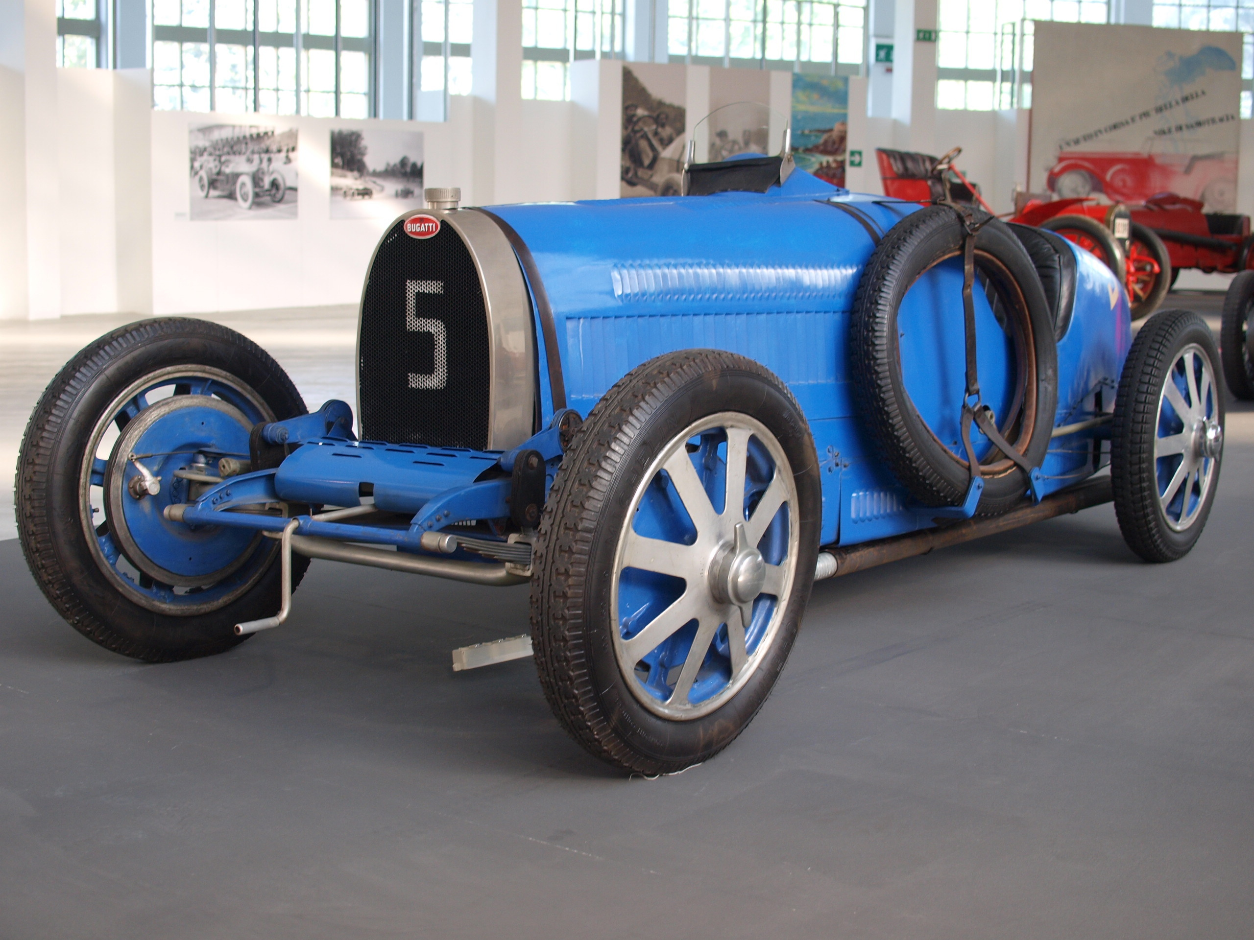 L'evoluzione dell'automobile